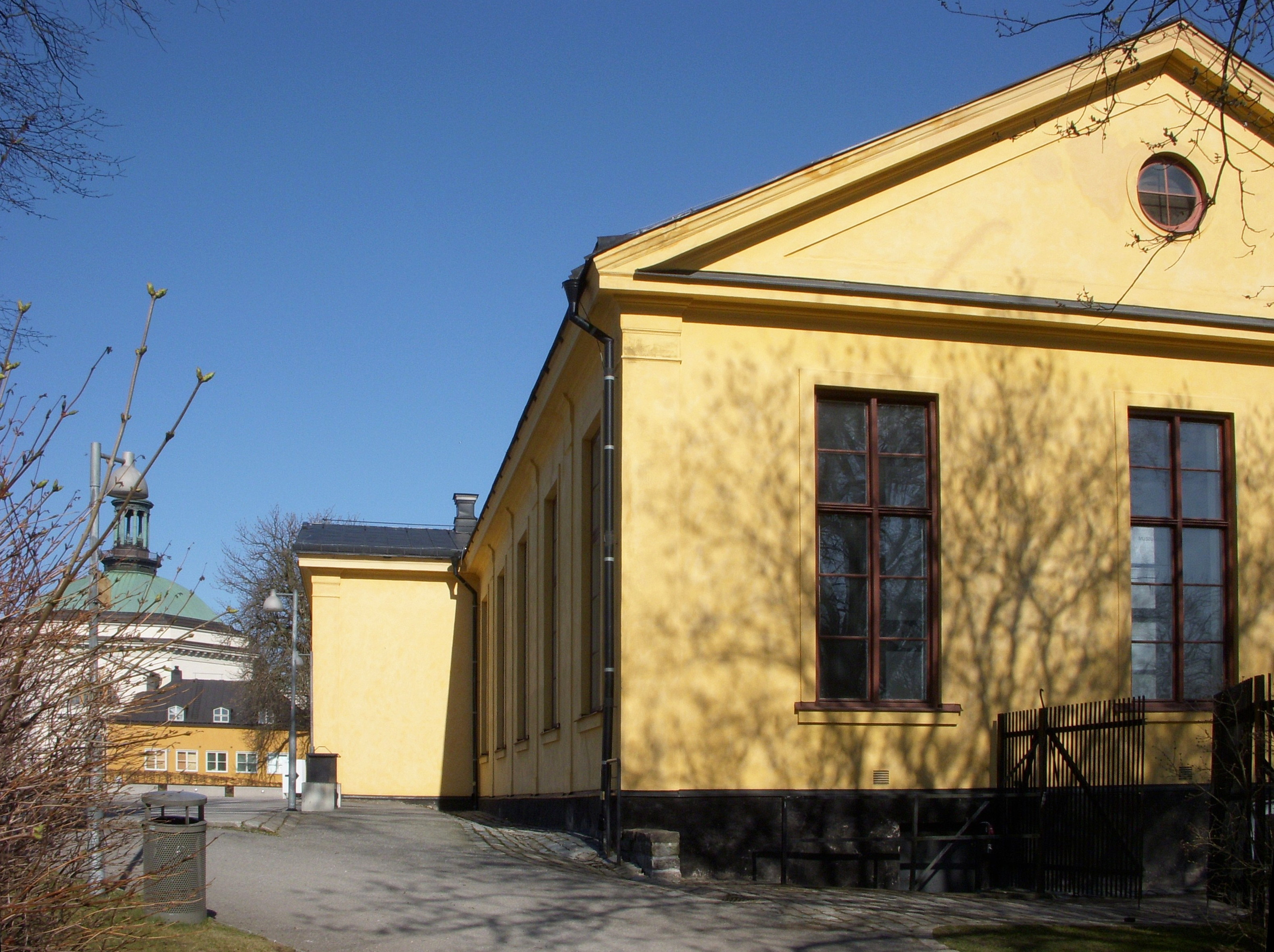 Arkitekturmuseet på Skeppsholmen (utställningslokalen)